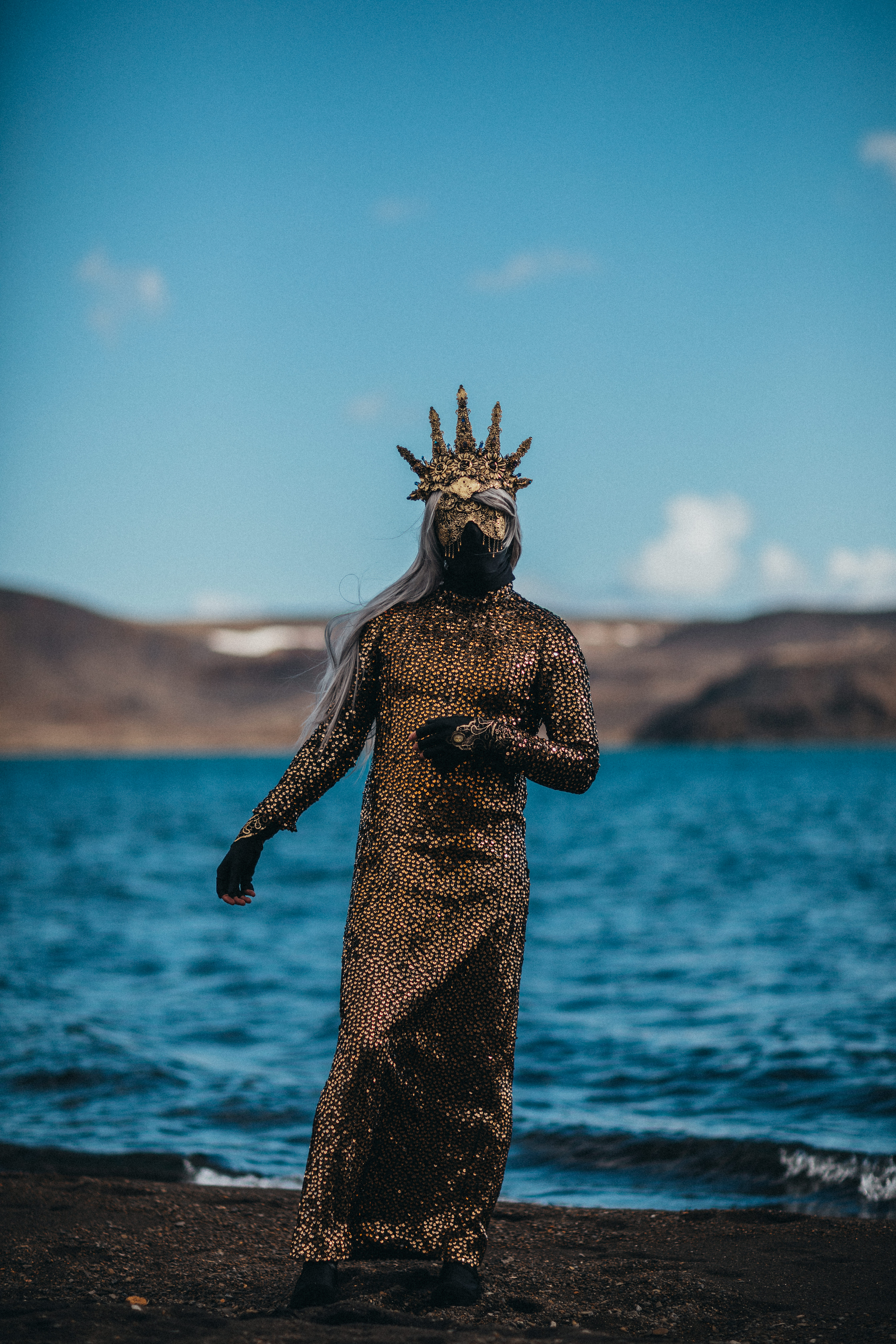 Tónlistarveran Mighty Bear